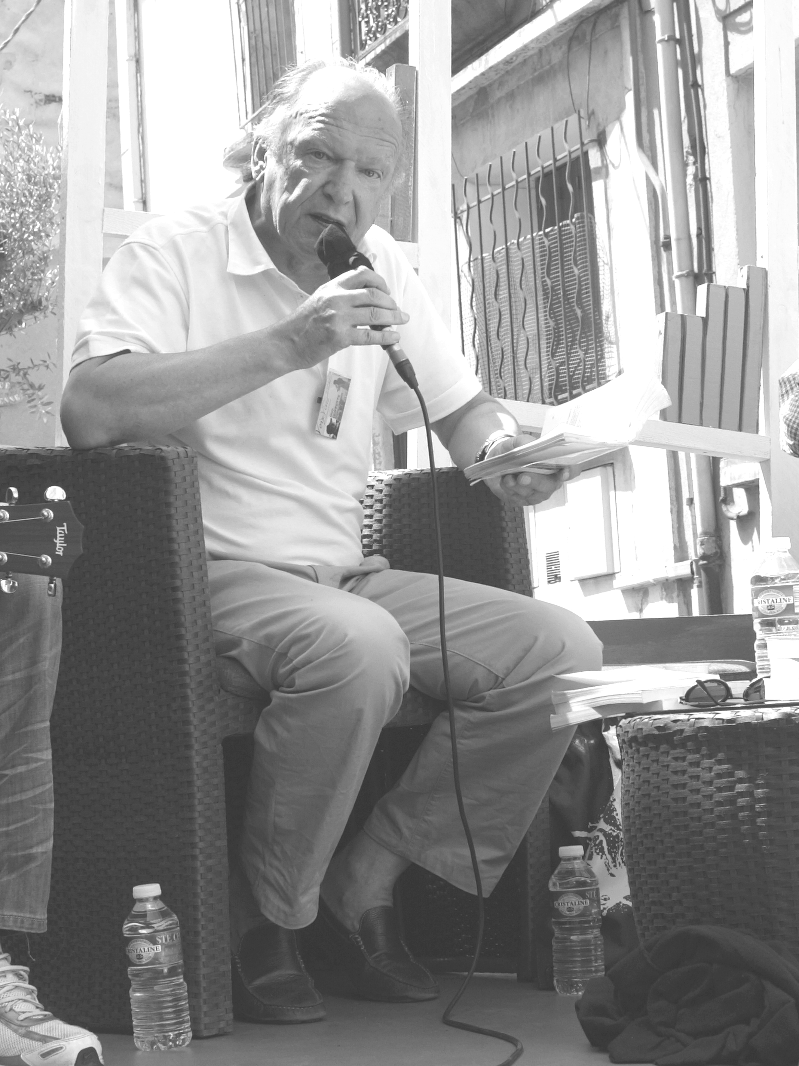 Sète, festival Voix Vives de Méditerranée en Méditerrannée, 2012